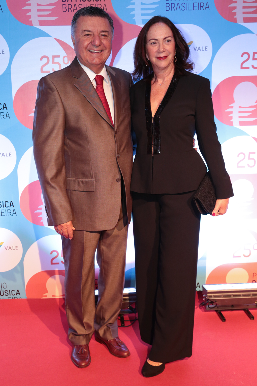 Arnaldo Cesar Coelho durante o 25º Prêmio da Música Brasileira no Theatro Municipal. Foto: Reginaldo Teixeira (14/05/14)